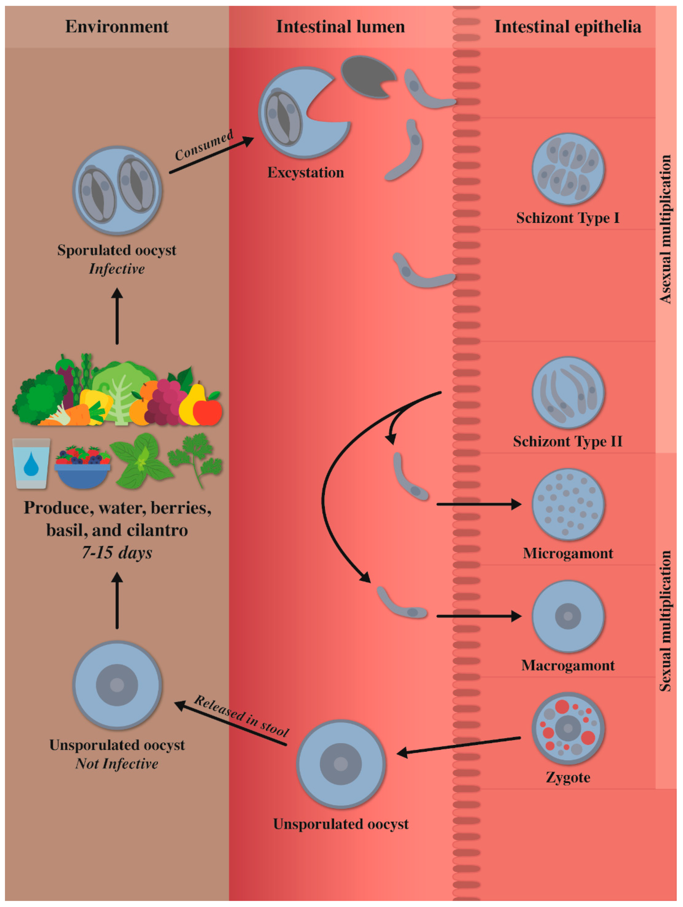 Esquema del cicle vital de C.cayetanensis. L'infecció es produeix per la ruta oral-fecal i es transmet a través de la ingestió d'aigua o aliments contaminats. Una vegada dins del cos els oocists es desenquisten i envaeixen les cèl·lules epitelials de l'intestí prim causant així l'infecció. Aquests completen el seu cicle i s'alliberen en forma de oocists inmadurs per la femta.